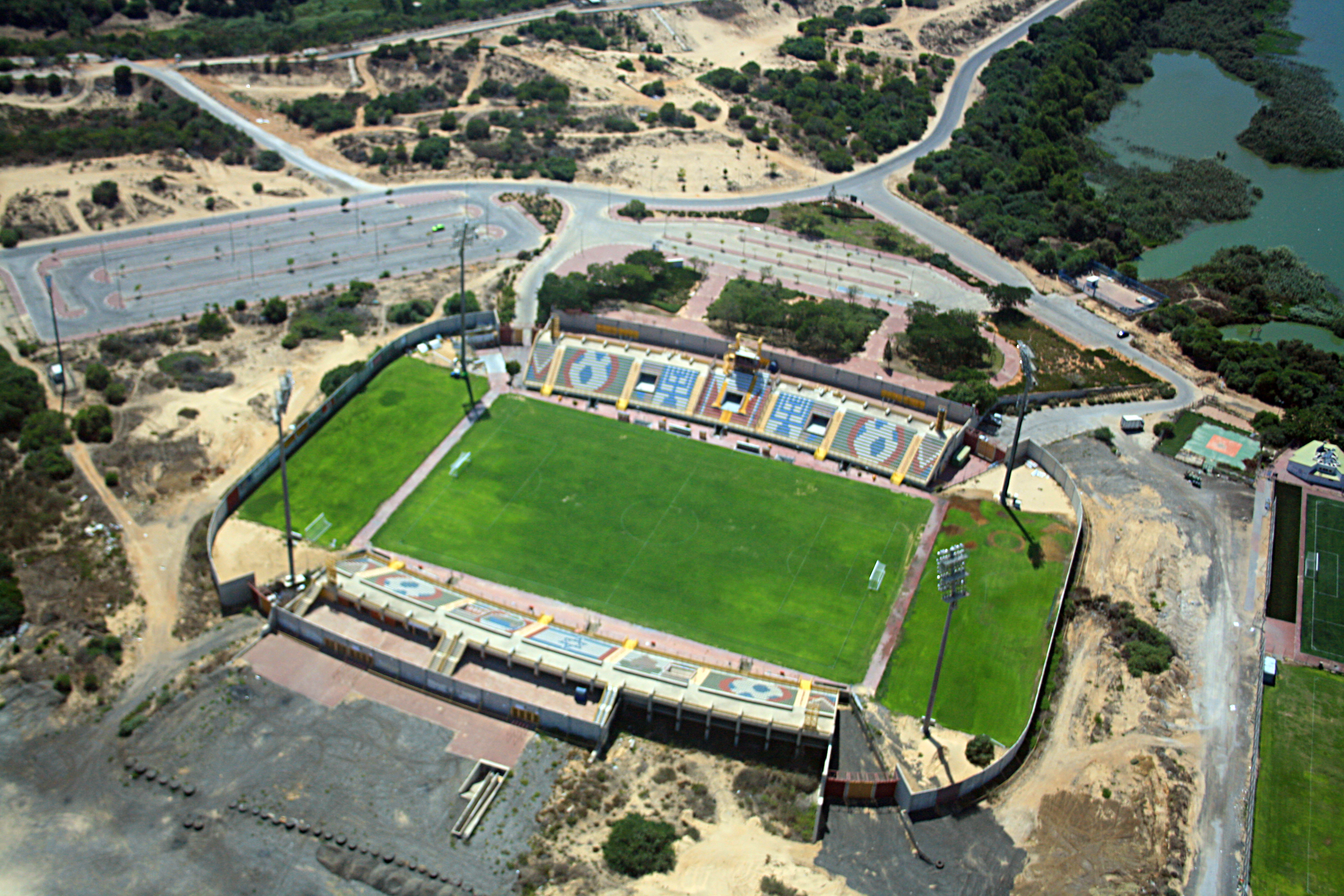 אצטדיון הברפלד ואגם הסופרלנד בראשון לציון.